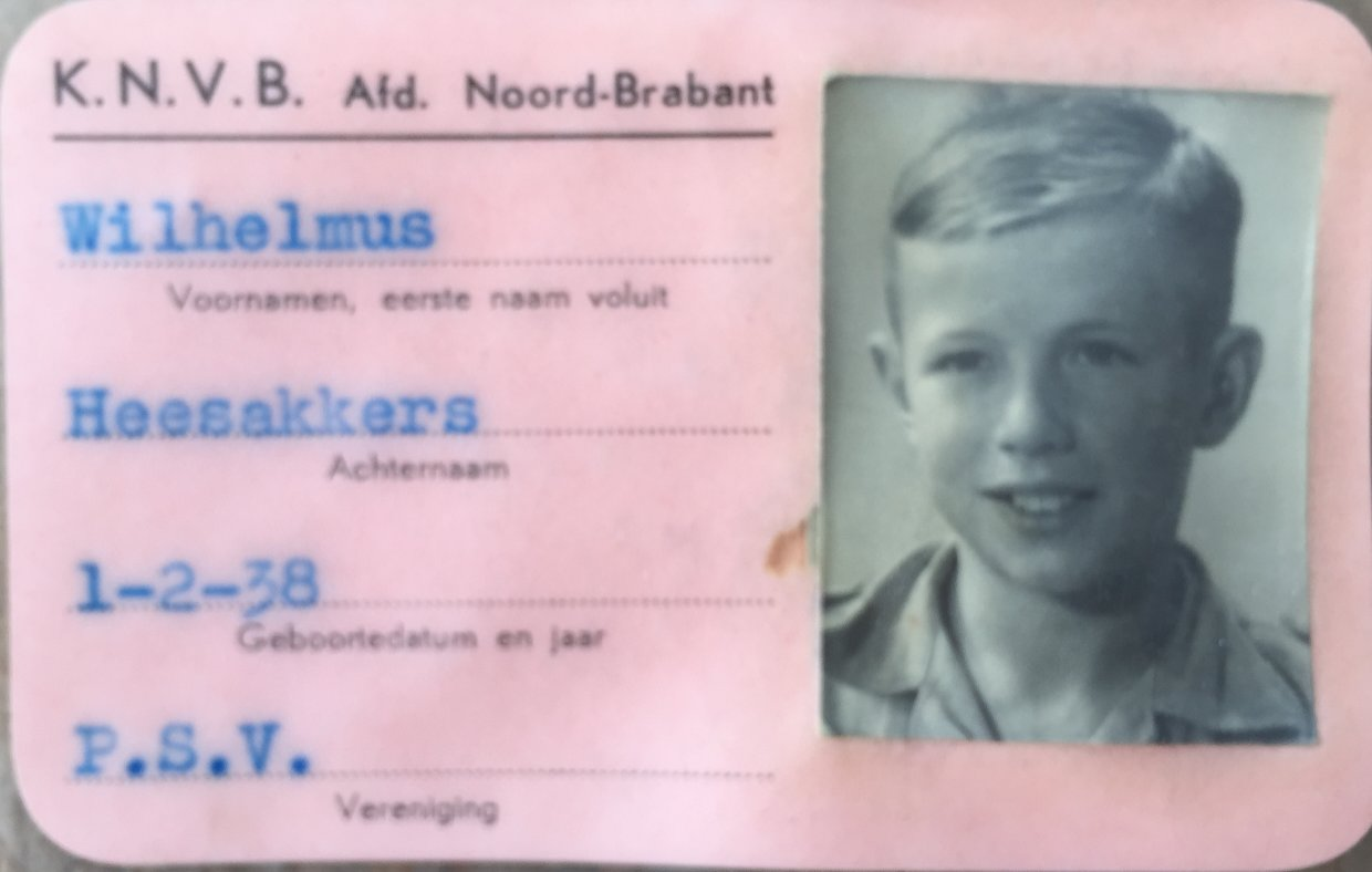 KNVB pasje Willie Heesakkers - PSV